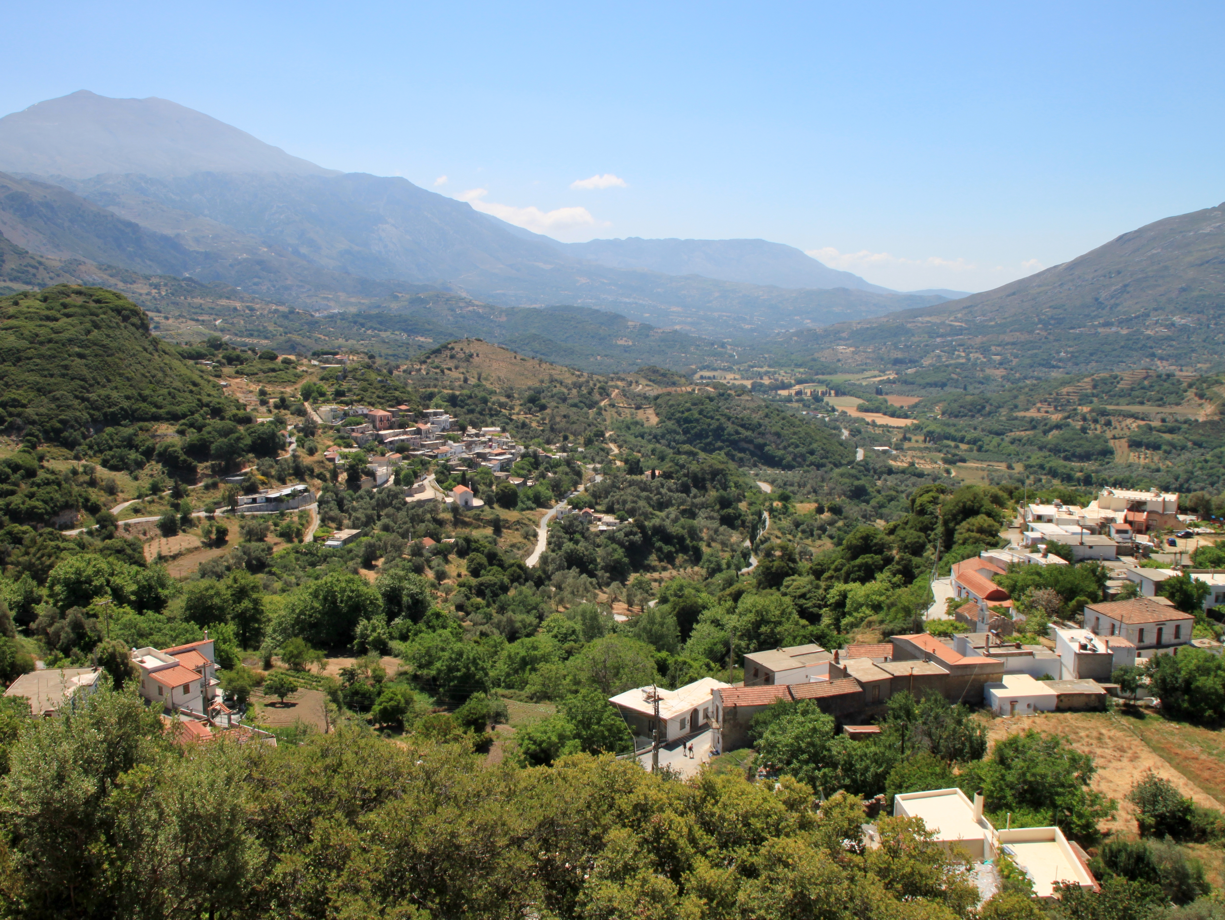 Blick über das Amari-Becken von Thronos, Gemeinde Amari, Regionalbezirk Rethymno, Kreta, Griechenland